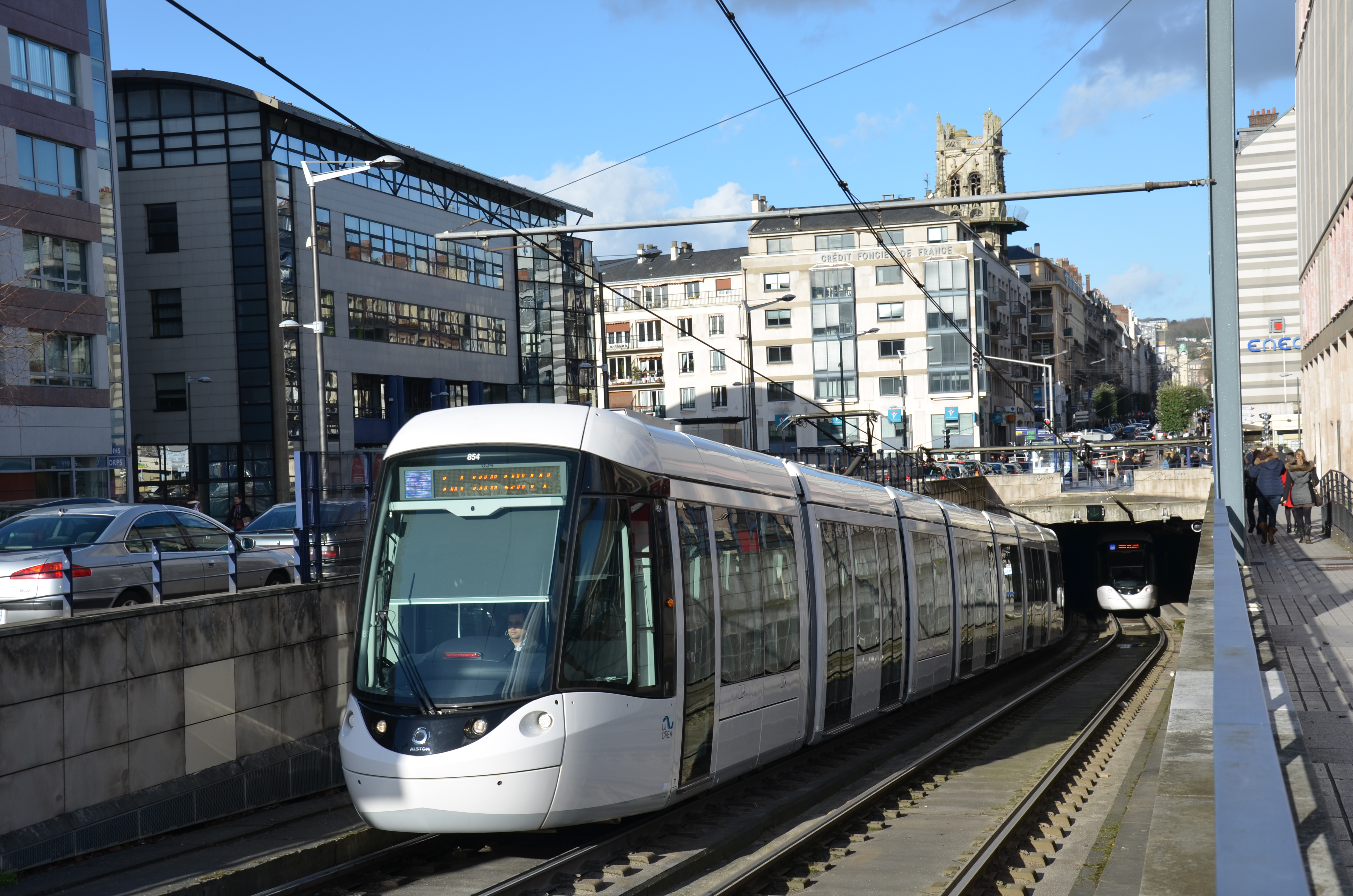 Alstom Citadis 302 n°854 sur le "Métro" de Rouen, après avoir passé la station Théâtre des Arts en direction de Georges Braque.